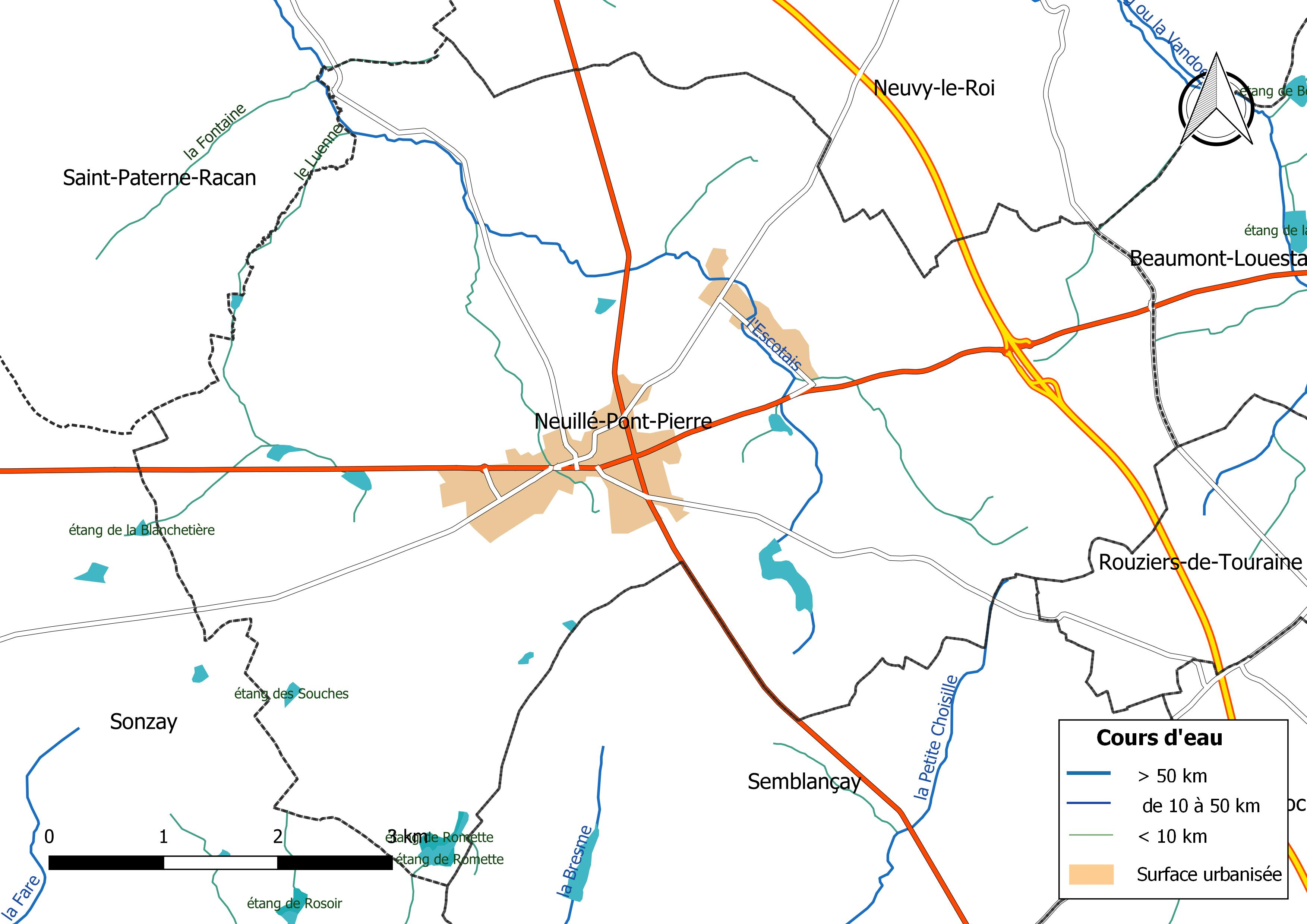 Carte du réseau hydrographique de la commune de Neuillé-Pont-Pierre (France).